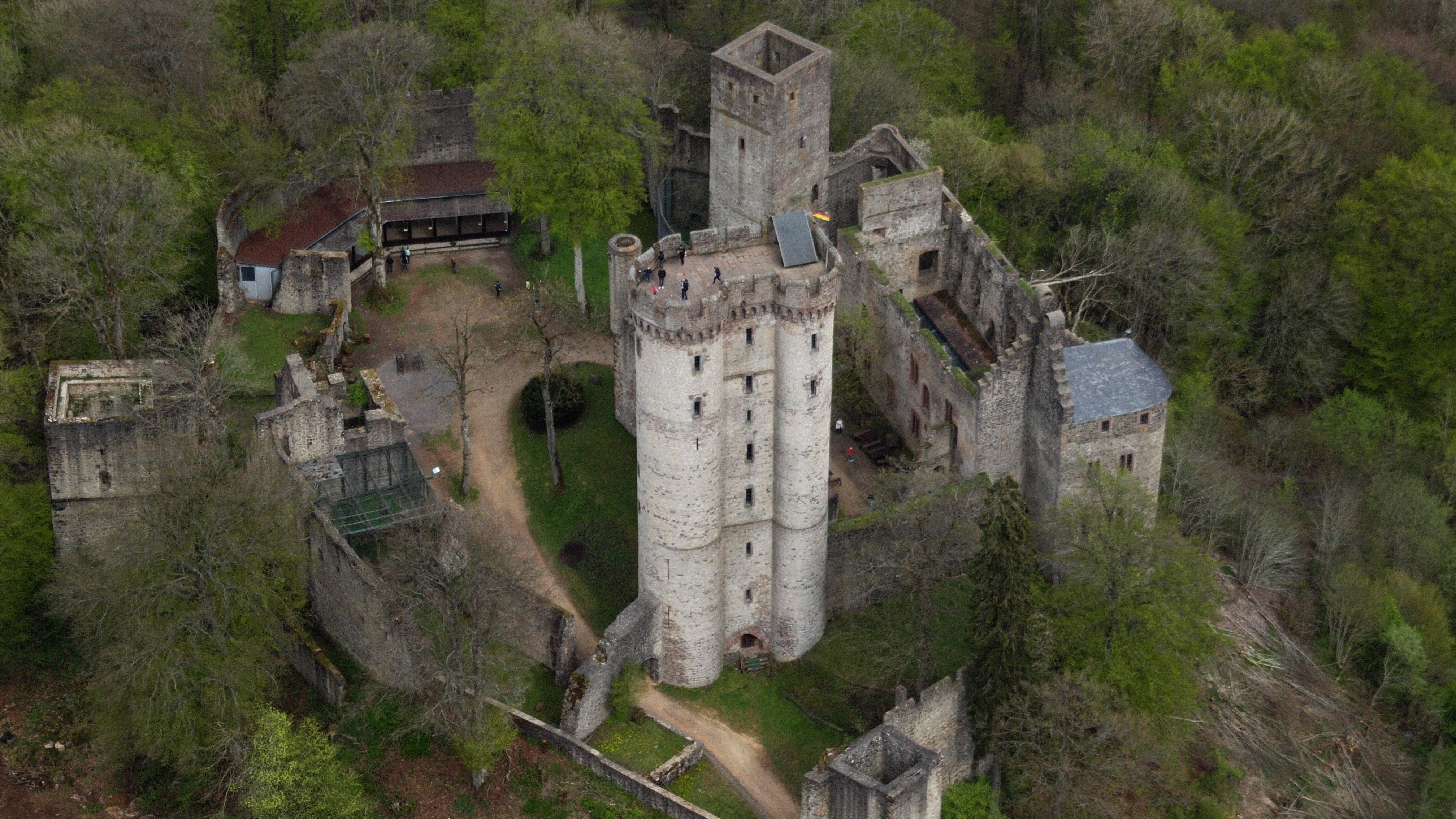 Kasselburg, westliche Ansicht, Luftaufnahme (2015)